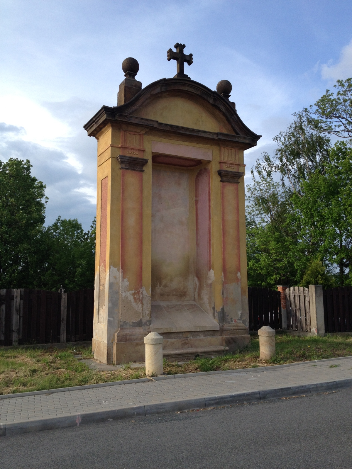 Dochovaná 10. kaple v Jivinách.